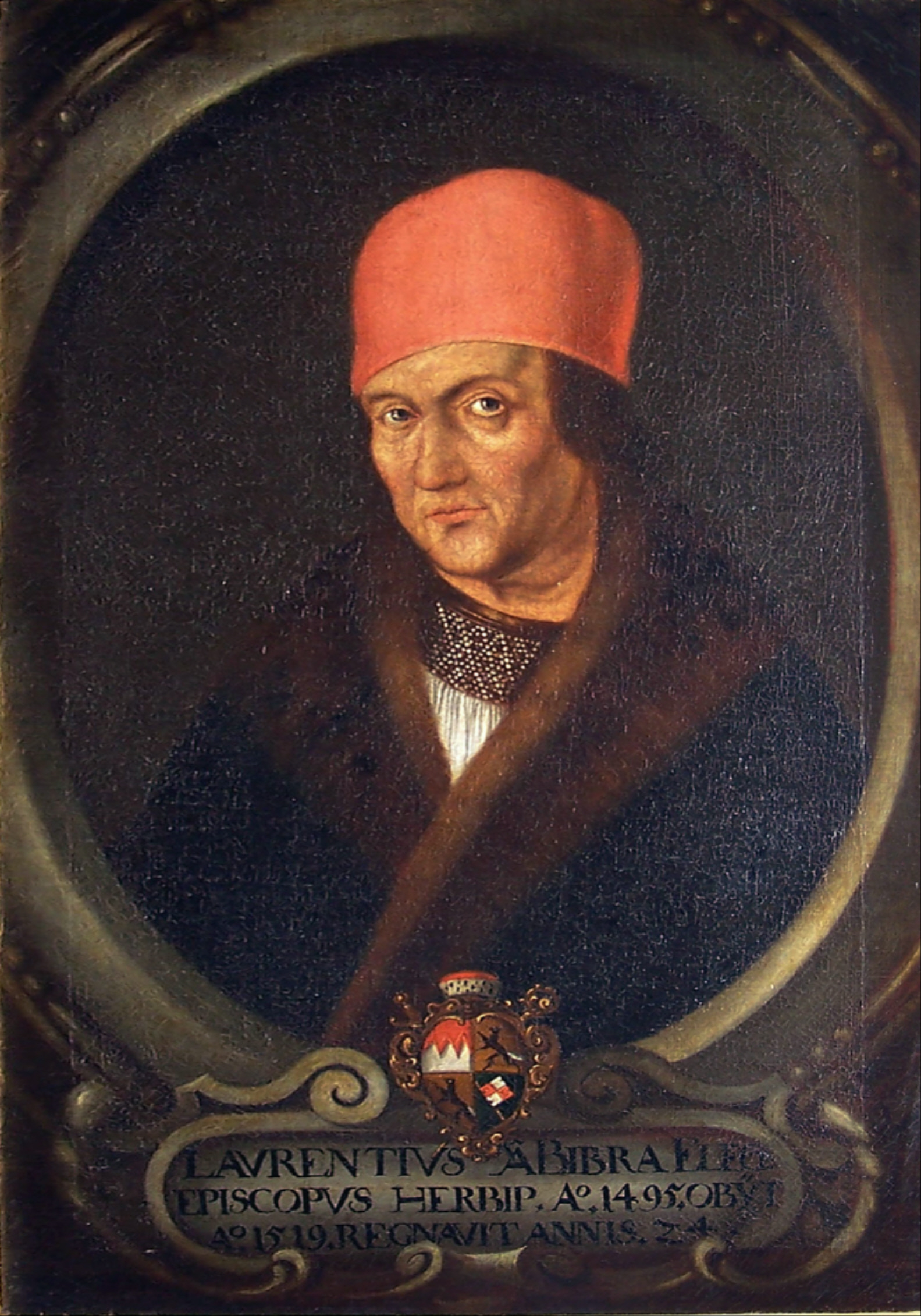 Portrait des Würzburger Bischofs Lorenz von Bibra, Feste Marienberg